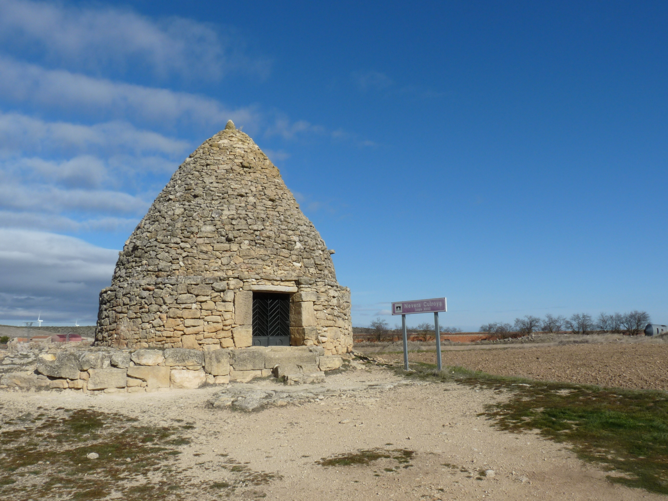 Fuendetodos - Nevera de Culroya s. XVIII o anterior